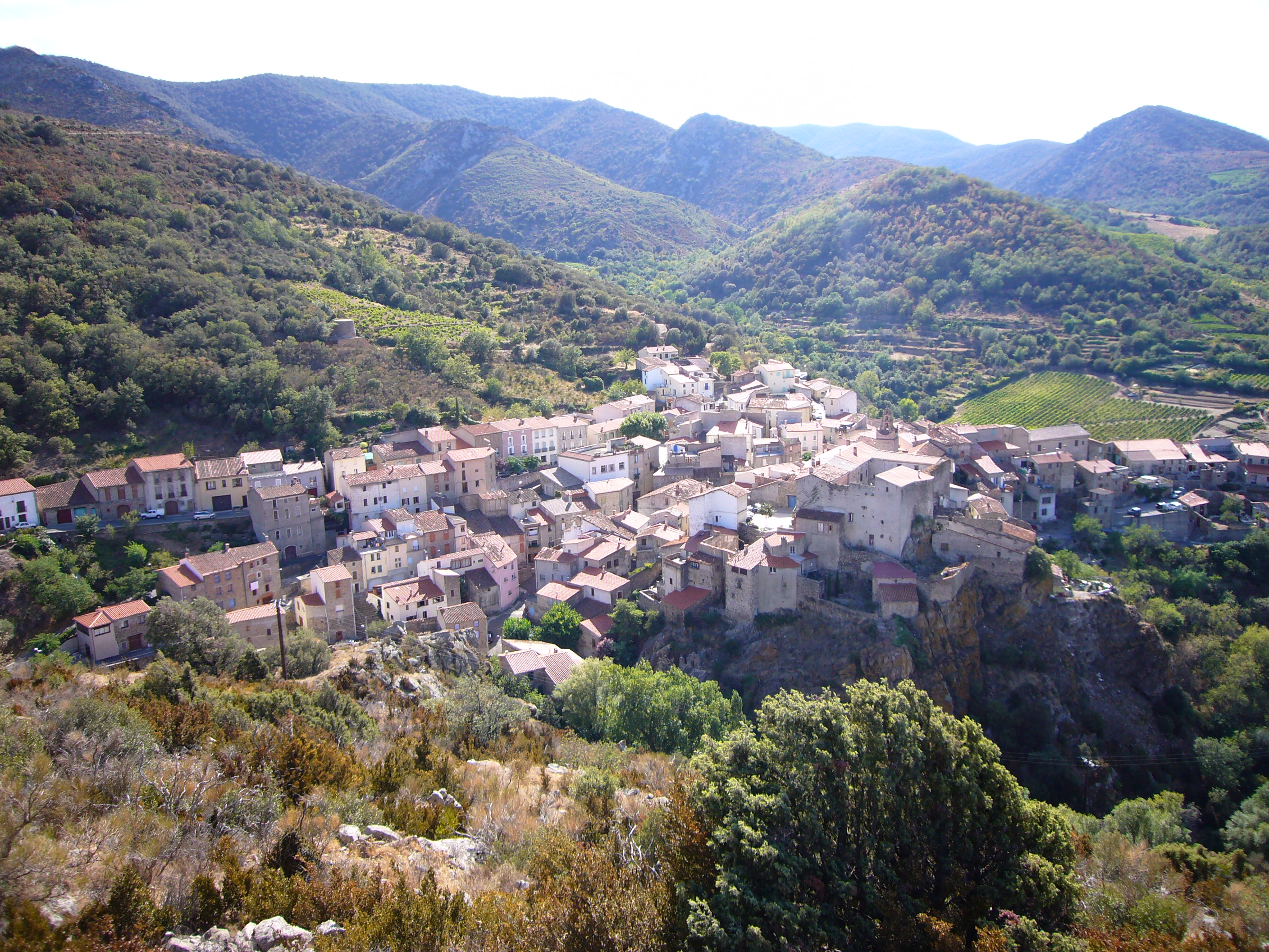 Vue du village de Caramany depuis le rocher de la Bade (66, France)